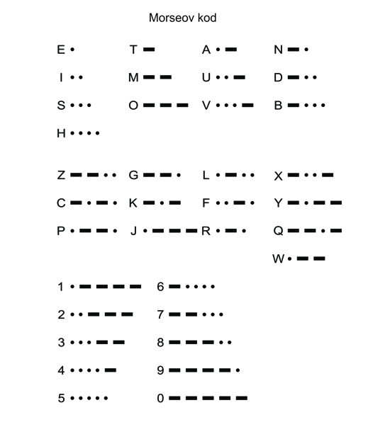 Morseov kod podeljen na krugove